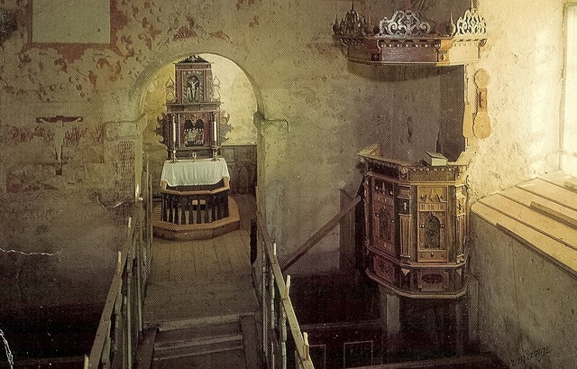 Moster gamle kirke